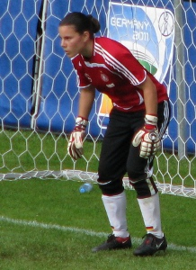 Ursula Holl